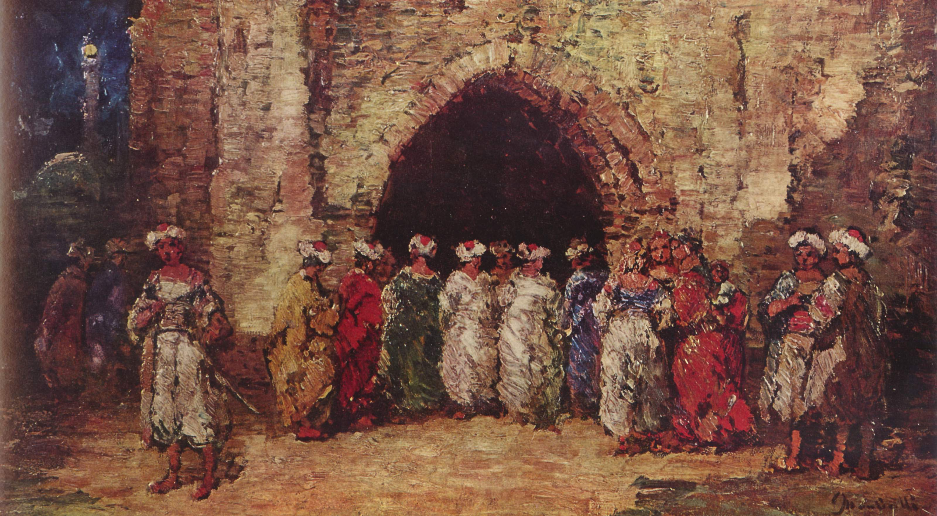 Algier